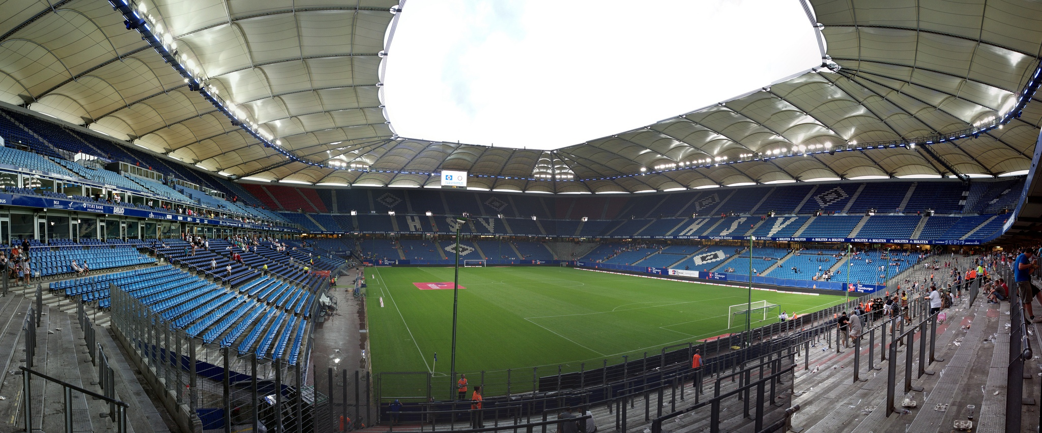 Das Volksparkstadion, Hamburg, seit 2010 offiziell imtech arena